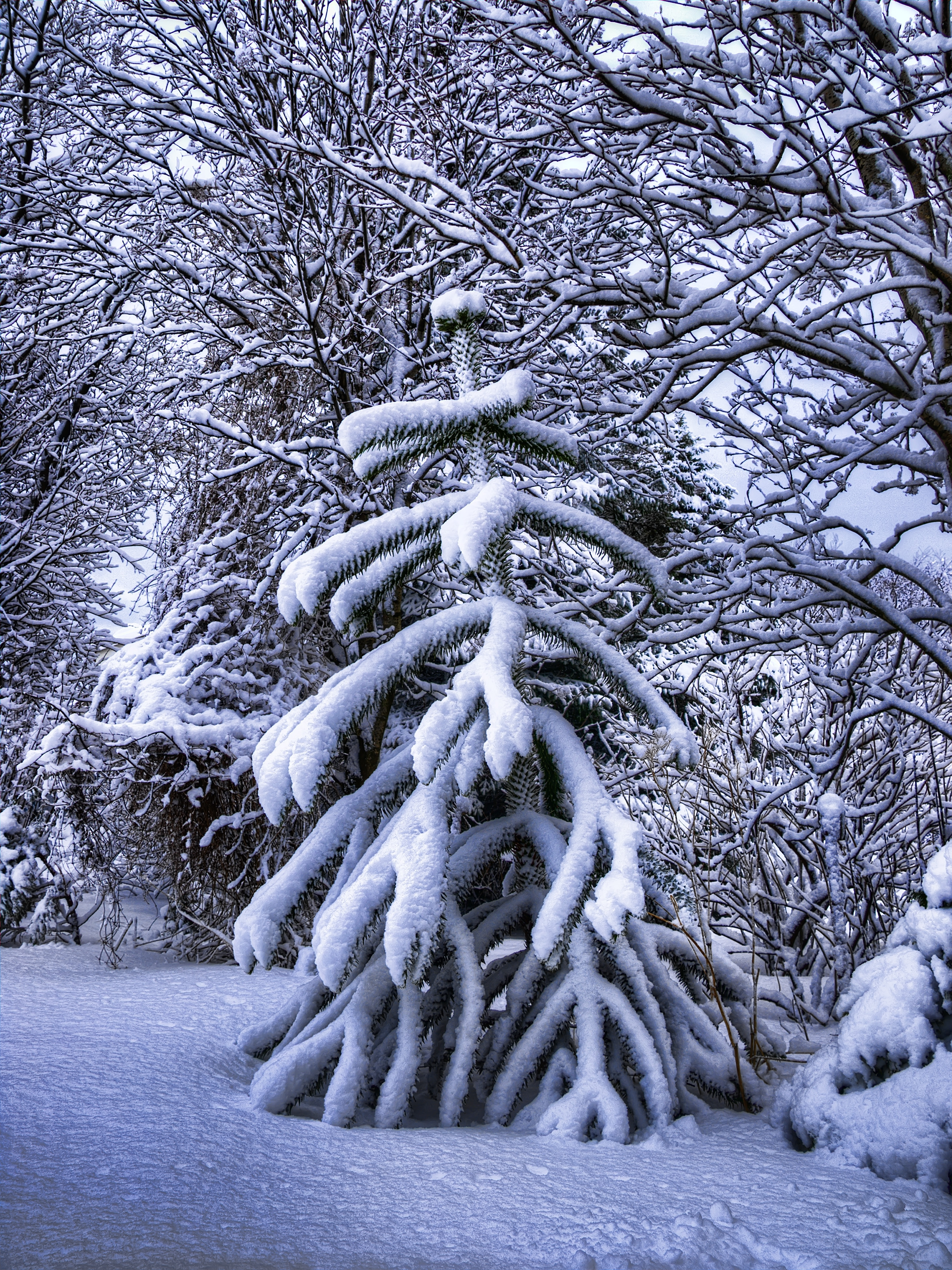 Araucaria araucana. Apahrellir.